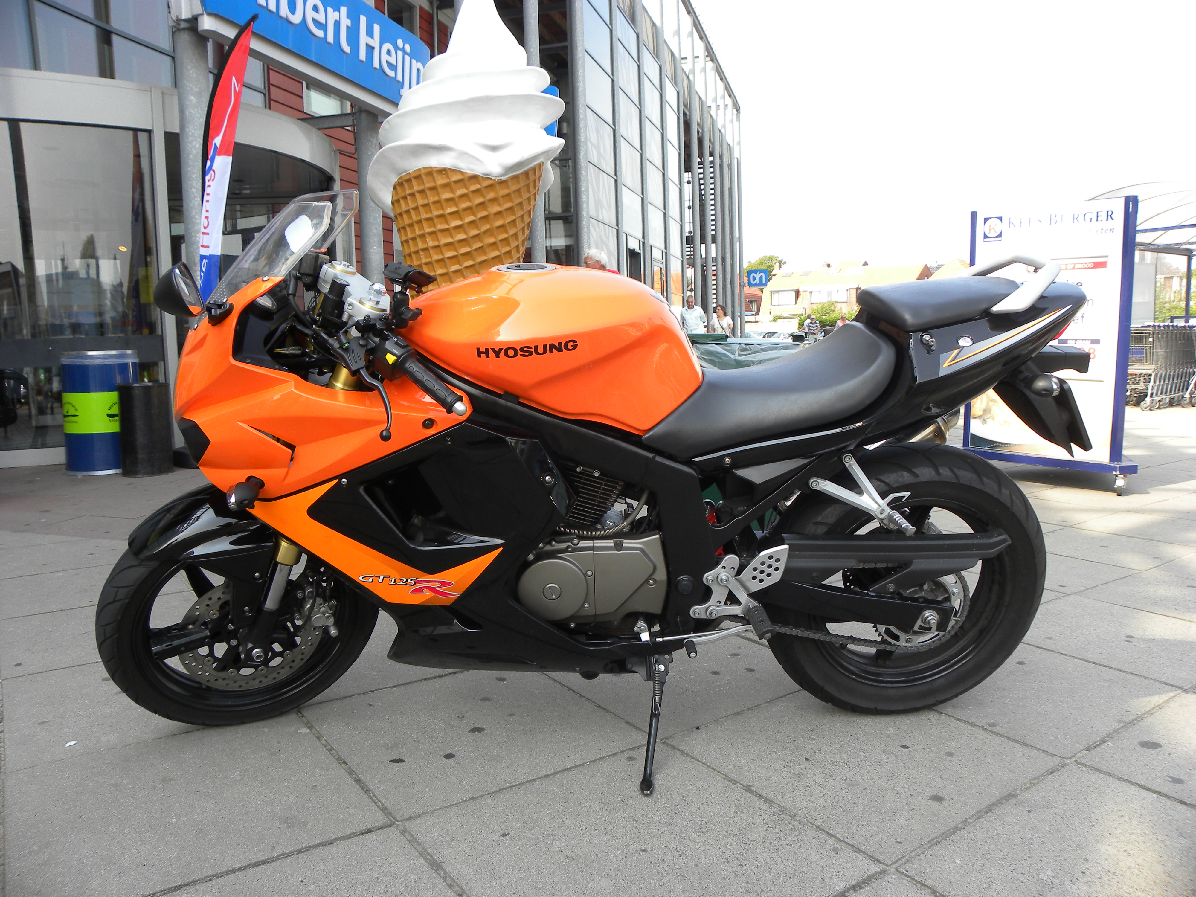 Hyosung GT 125 R